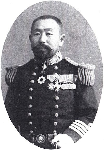 吉見乾海海軍中将